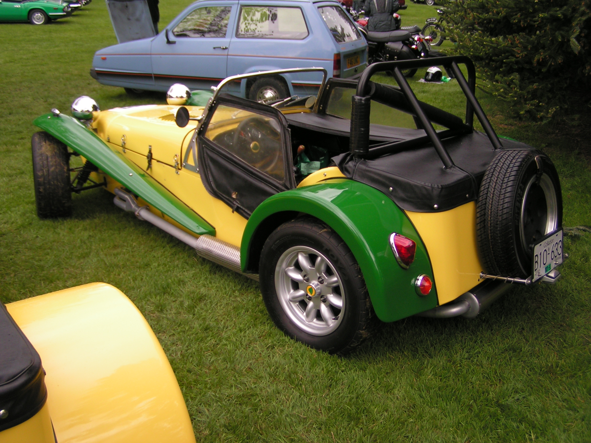 1965 Lotus Seven Series II1965 Lotus Seven Series II